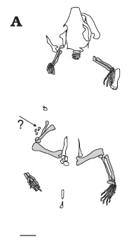 Sinobaatar skeleton